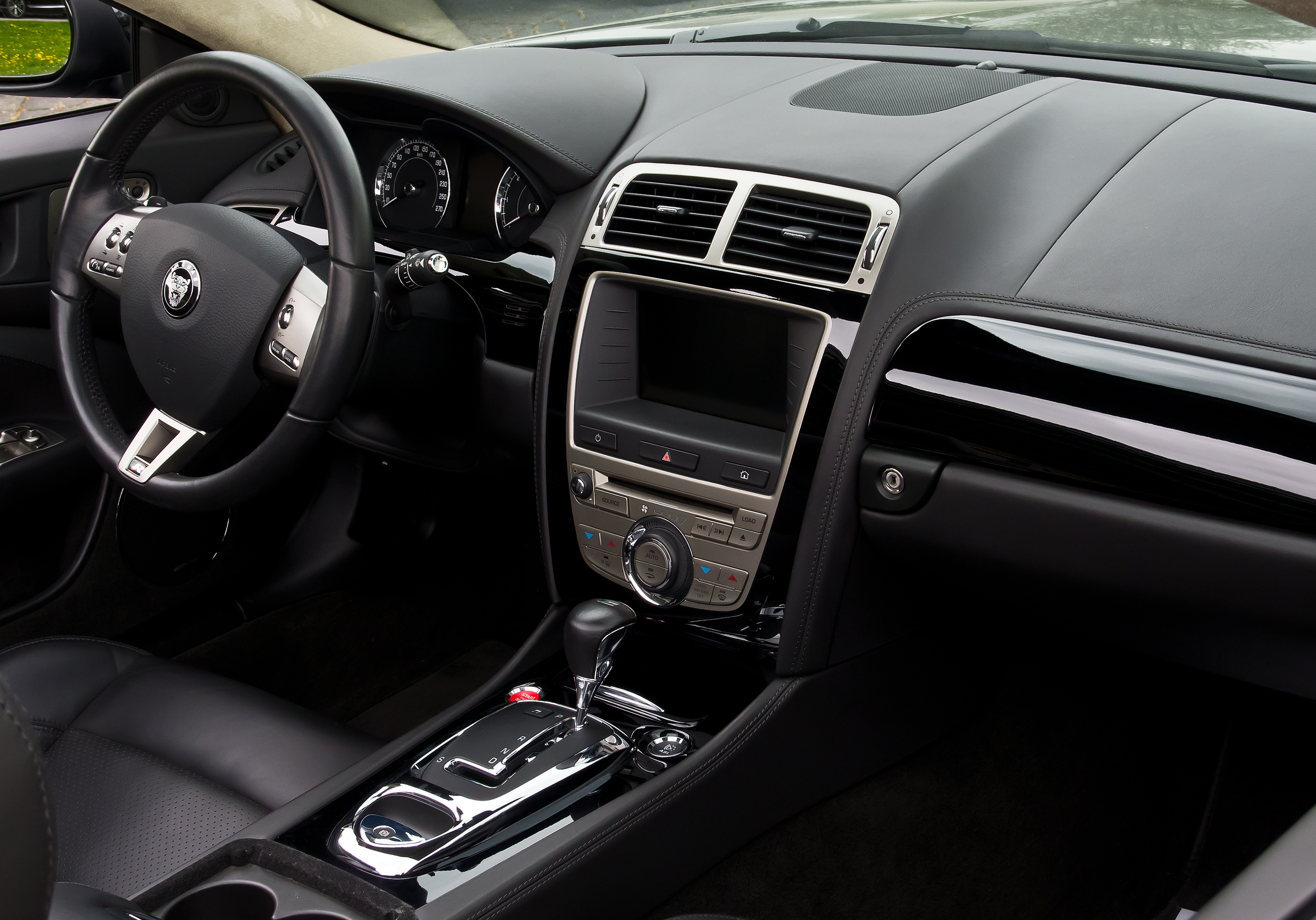 Jaguar XKR Cabriolet (X150)